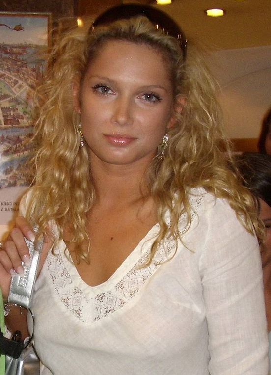 Joanna Liszowska (ur. 12 grudnia 1978 w Krakowie) – polska aktorka, piosenkarka i modelka.